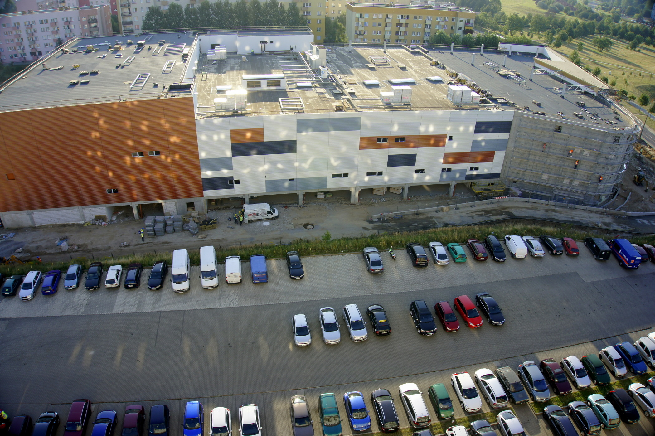 Gorzów Wlkp., ul. Kombatantów, sierpień 2015 r.. " Galeria Manhattan ", centrum handlowe na miesiąc przed planowanym otwarciem.